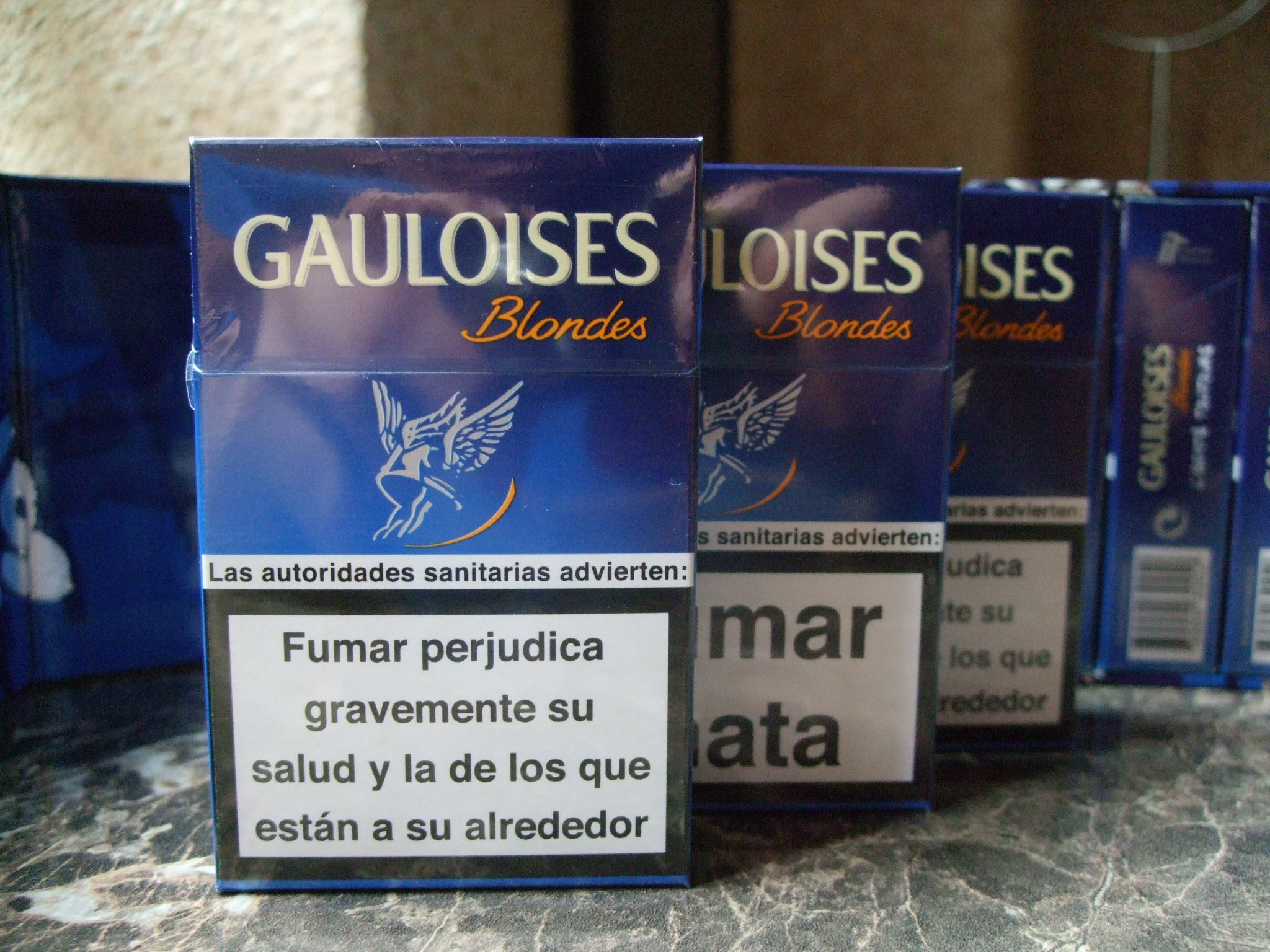 Gauloises, wersja hiszpańska.